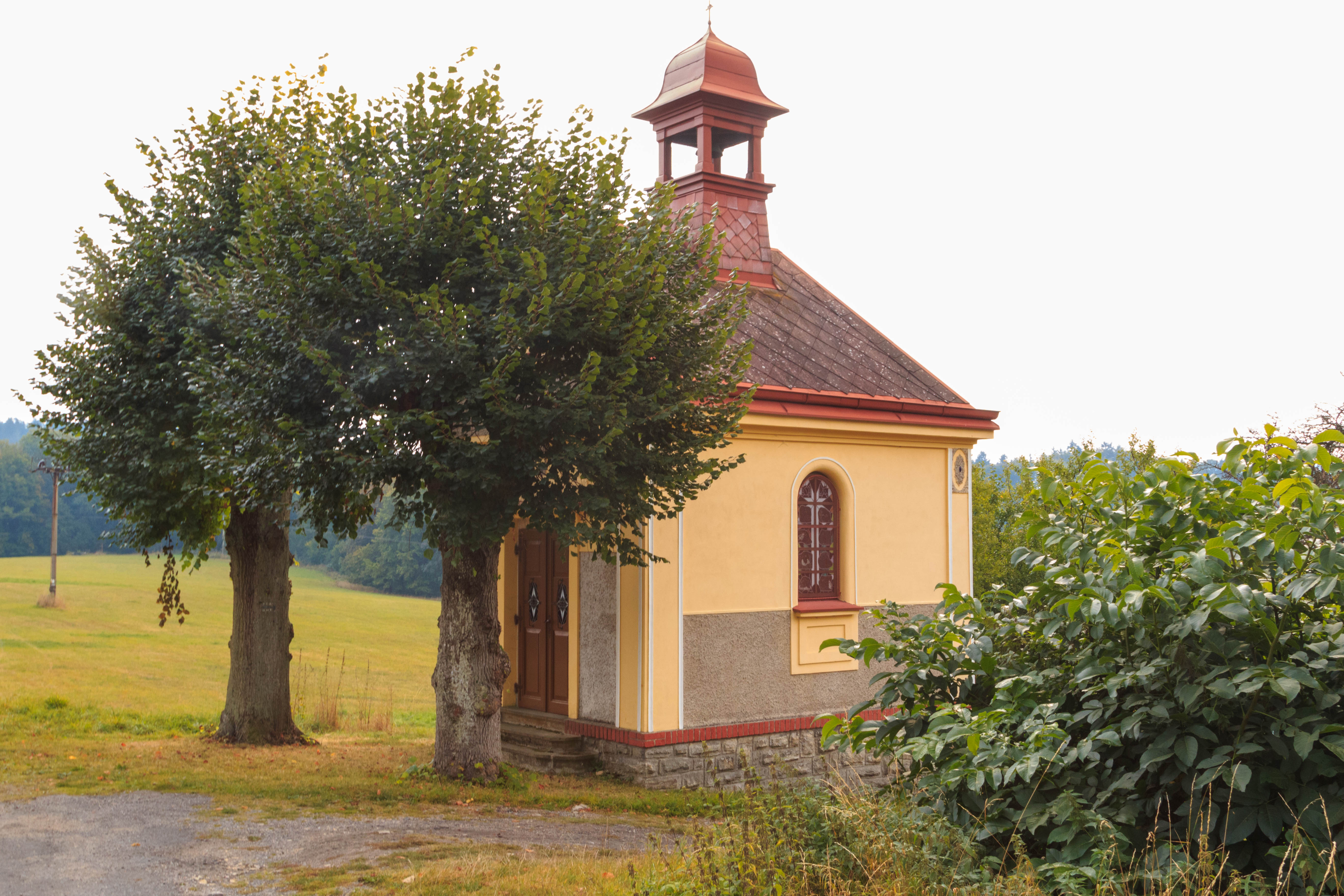 Hrádek u Jehnědí - kaple